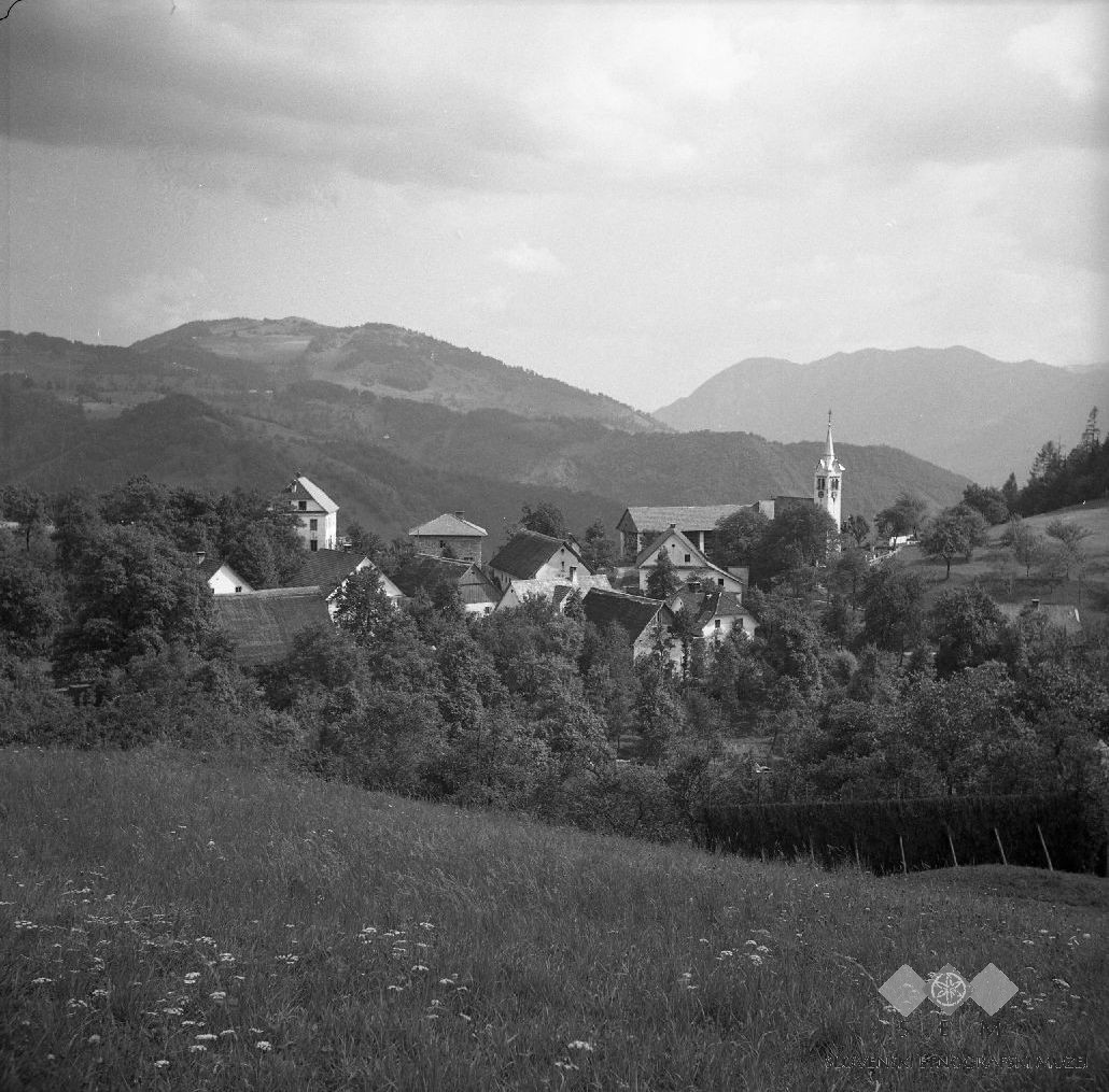 Pogled na Gorenje Ravne pri Cerknem.